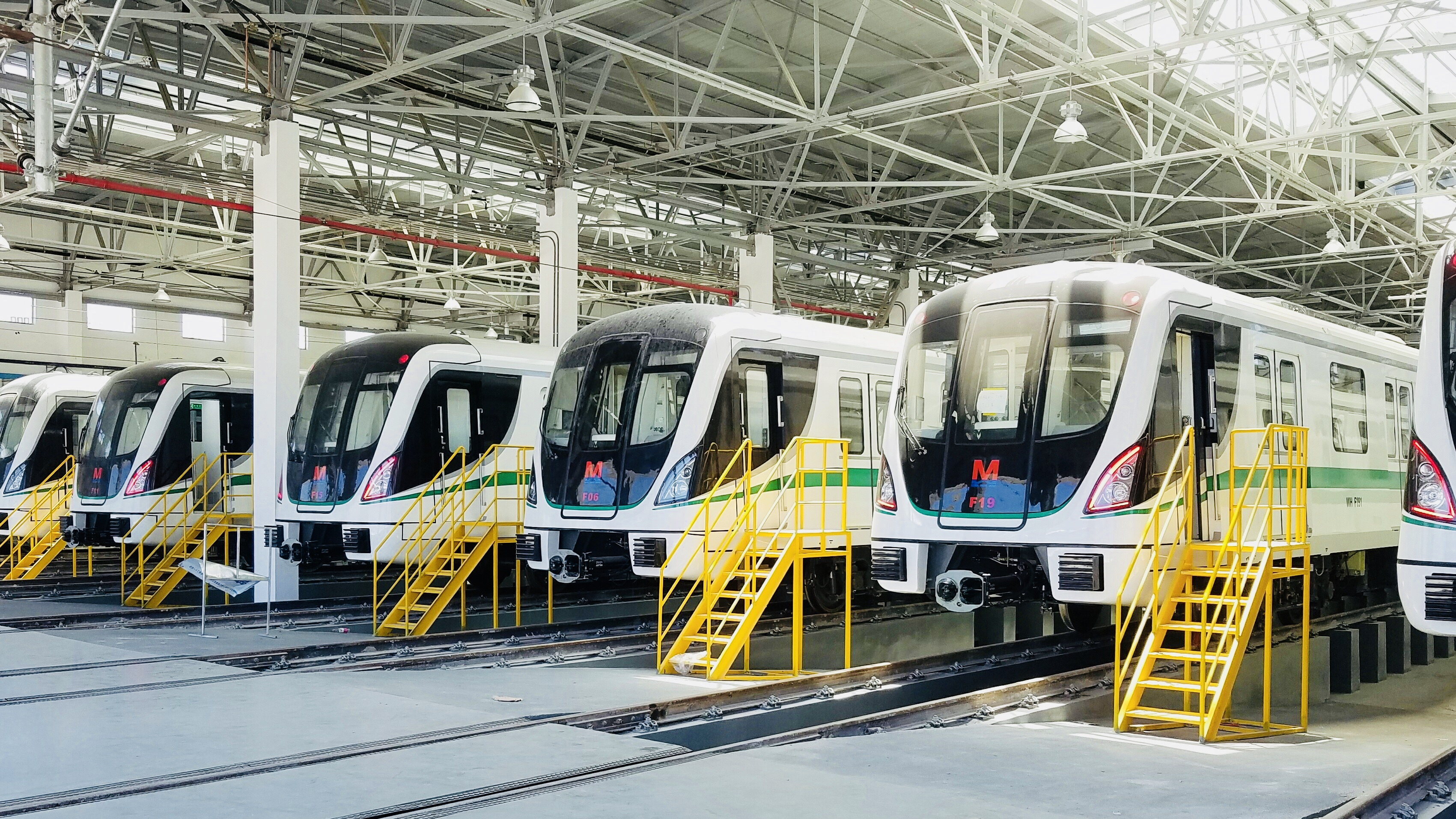 武汉地铁6号线列车